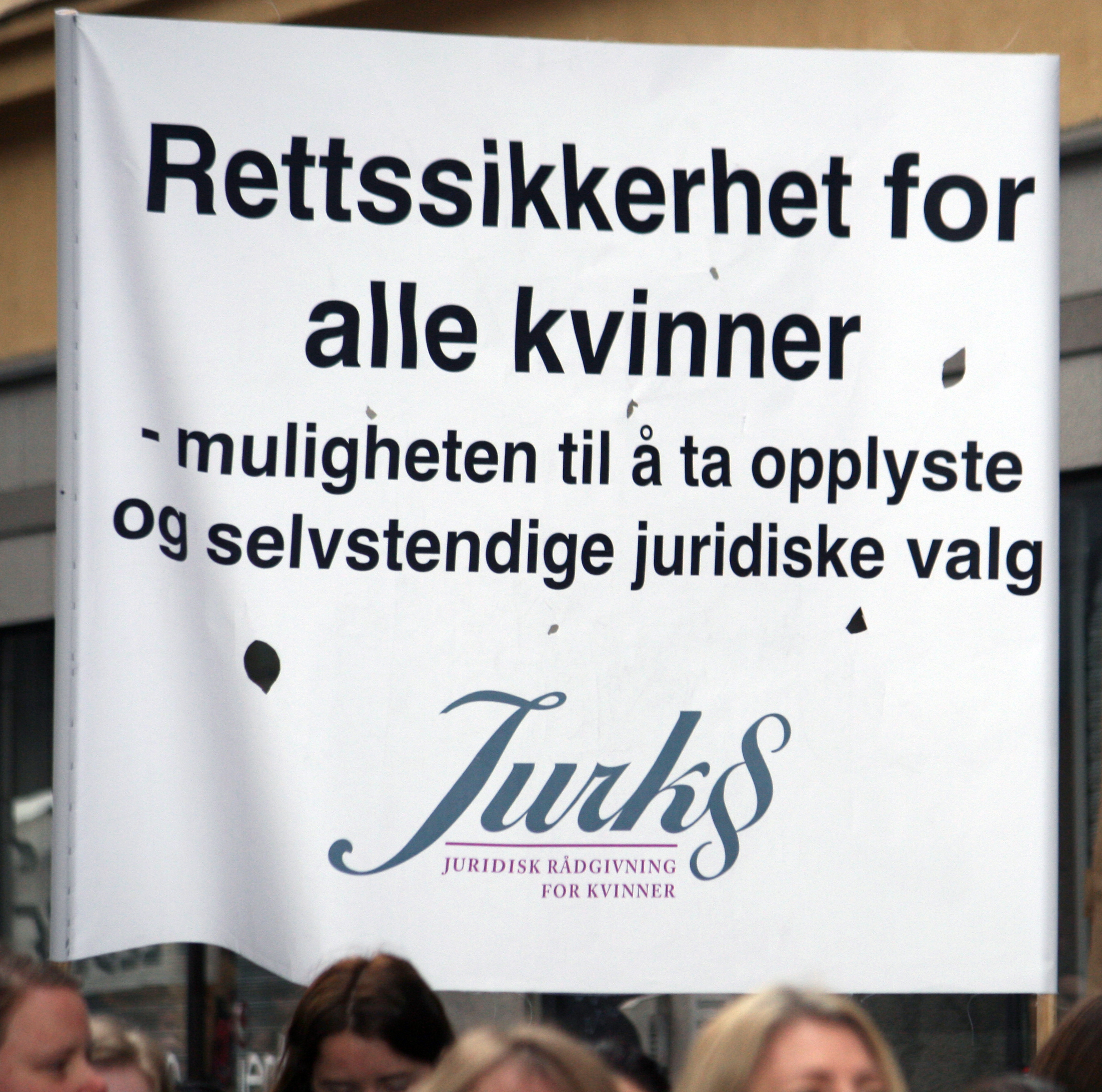 Juridisk rådgivning for kvinner på 8. mars-demonstrasjon i Oslo 2014